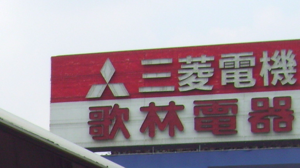 臺北市中正區忠孝西路一段，台灣三菱電機與歌林公司共用的廣告霓虹燈。